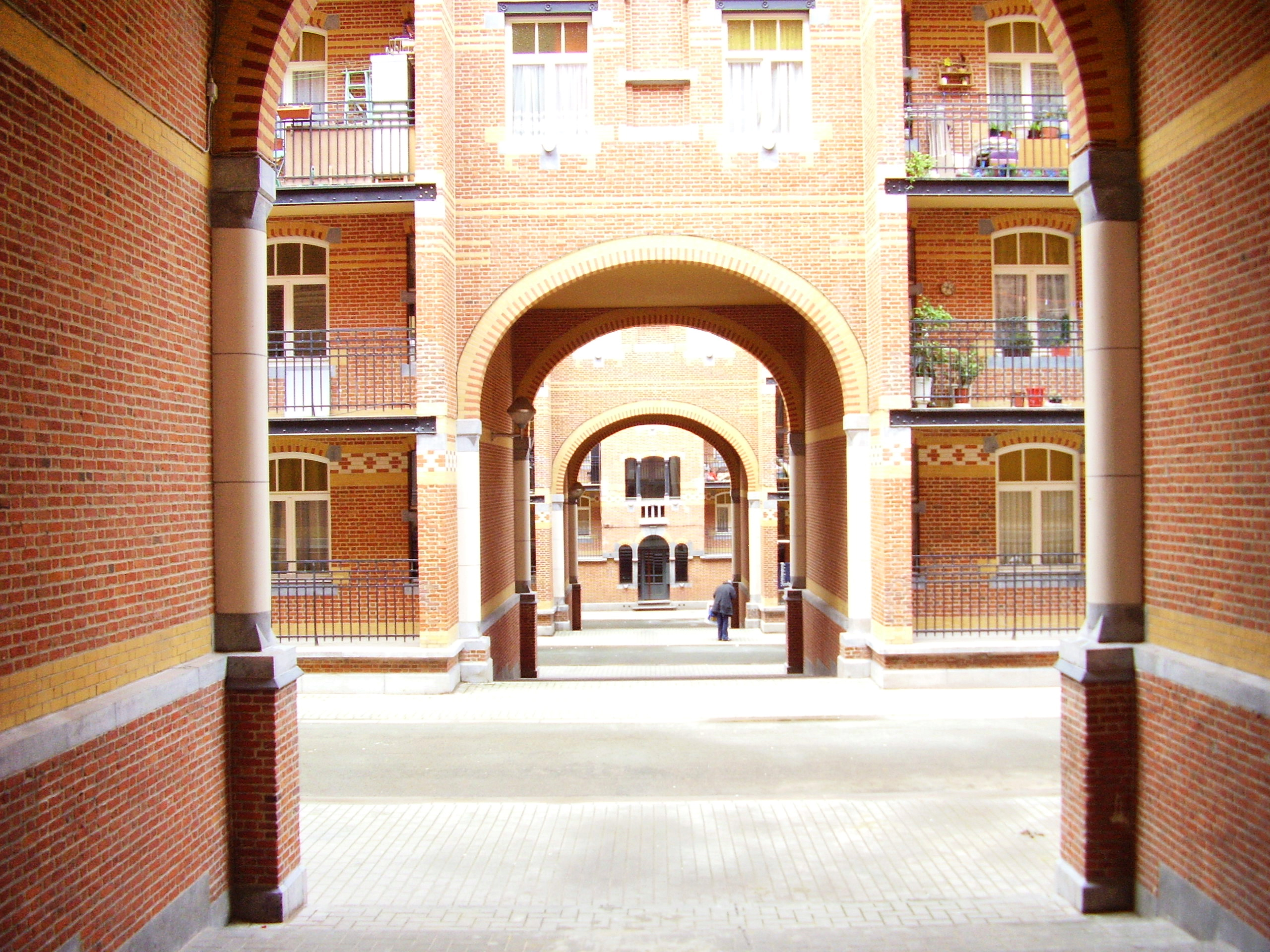 Description: Cité Hellemans (1915), quartier des Marolles (Bruxelles) Author: User:Ben2 Date of creation: 05 juillet 2006 Source: Photo personnelle